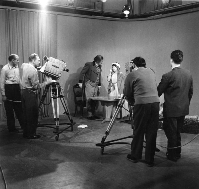 Fernsehstudio Köln Szene aus dem Stück "Der Struwelpeter". Ständig begleiten die Assistenten die Kameramänner bei der Arbeit.